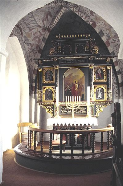 Sønder Asmindrup Kirke i Danmark. Kor og altertavle